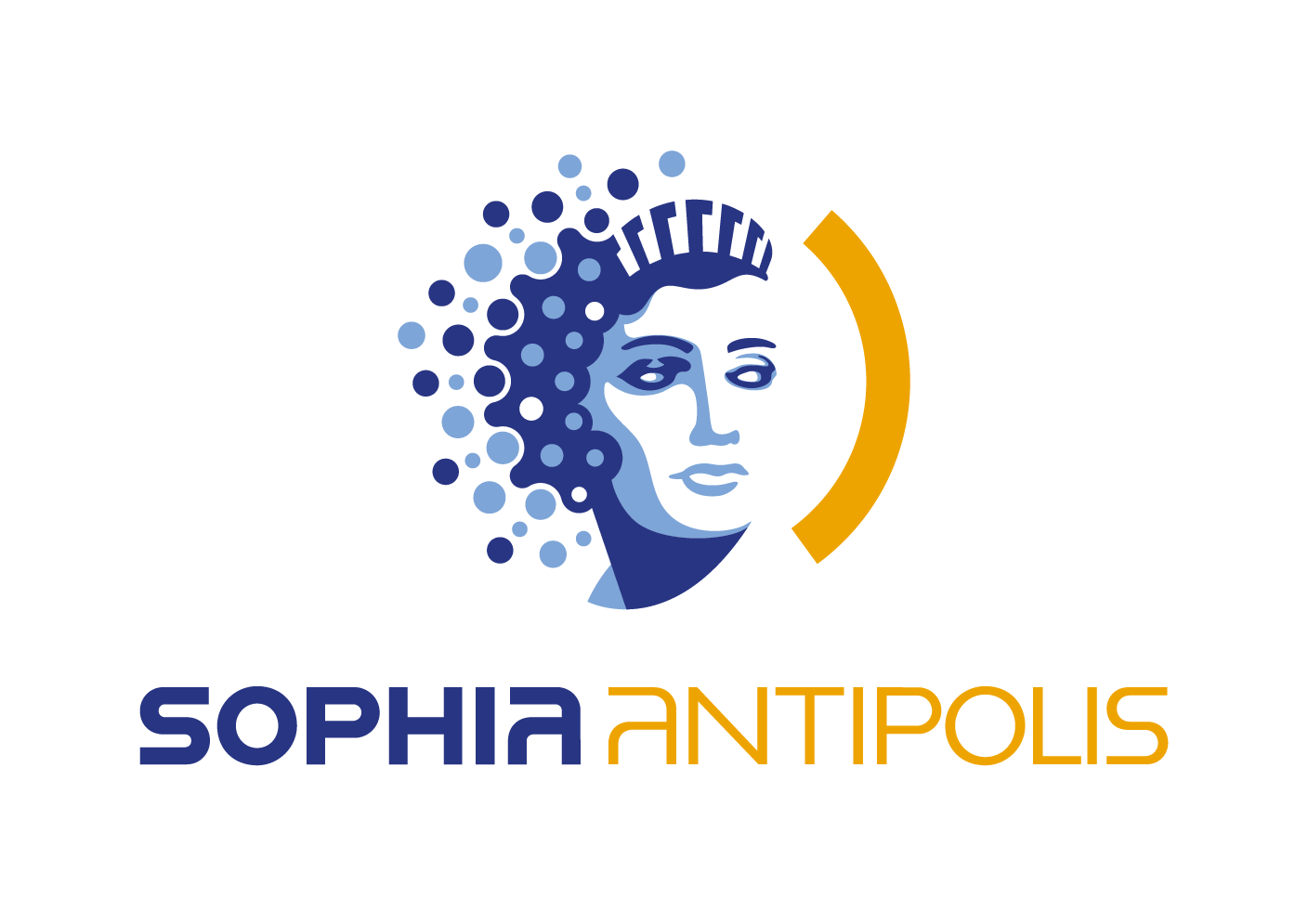 Crédit Brandsilver